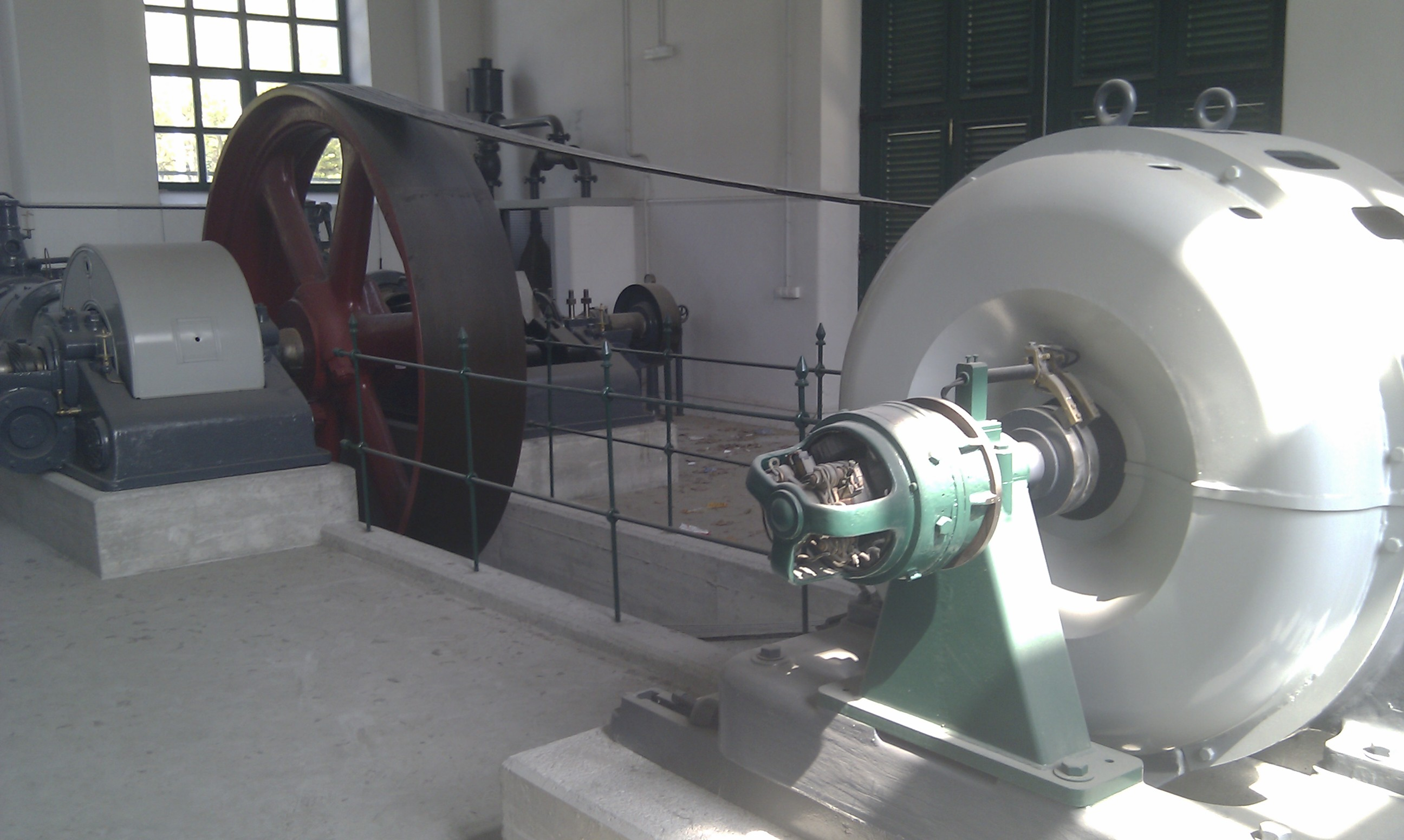 Gaso motor de la Fábrica de Gas de Morlans